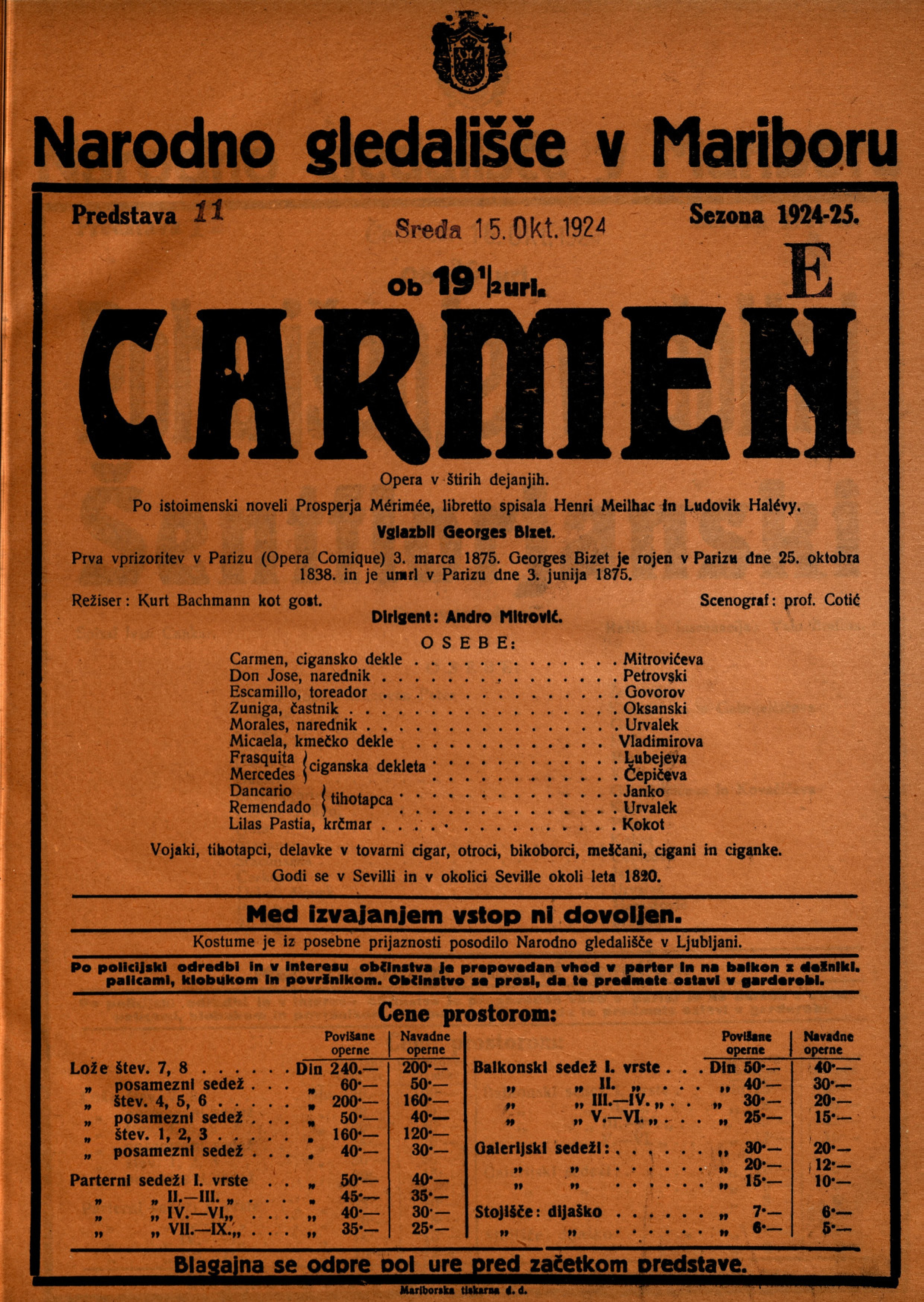 Plakat za predstavo Carmen v Narodnem gledališču v Mariboru.